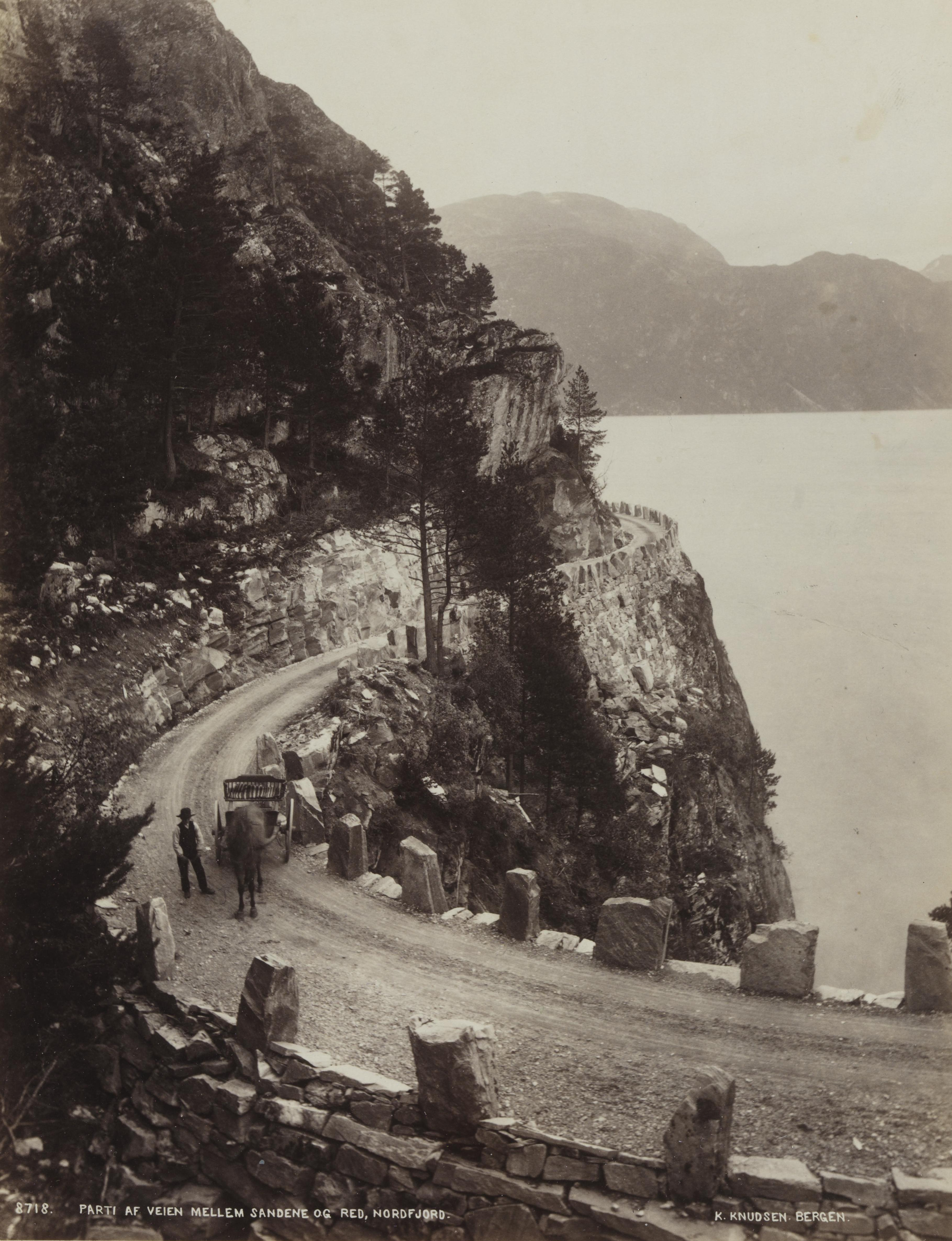 Bildet er hentet fra Nasjonalbibliotekets bildesamling Sandane, Gloppen, Sogn og Fjordane